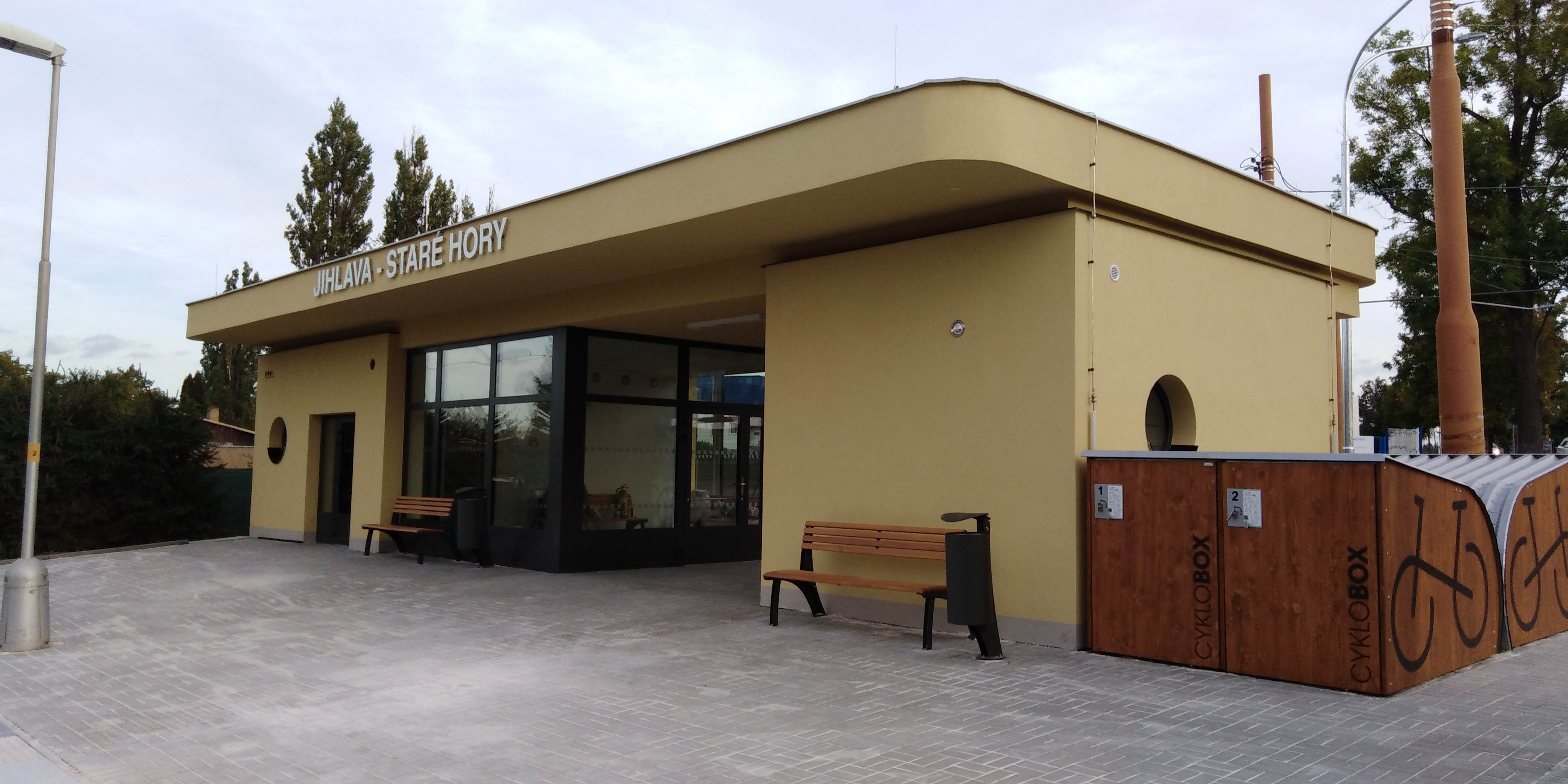 Železniční zastávka Jihlava-Staré Hory po modernizaci proběhlou v roce 2019. Pohled od železniční tratě.